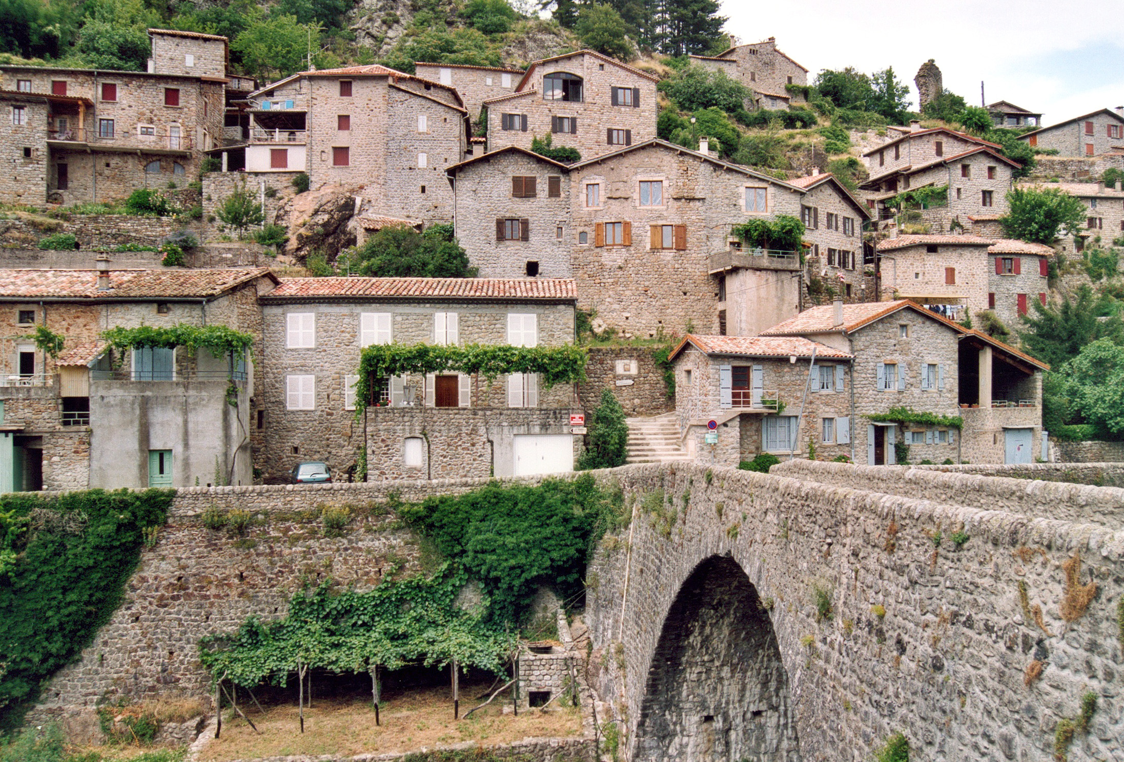 France Ardèche Jaujac Photographie prise par GIRAUD Patrick